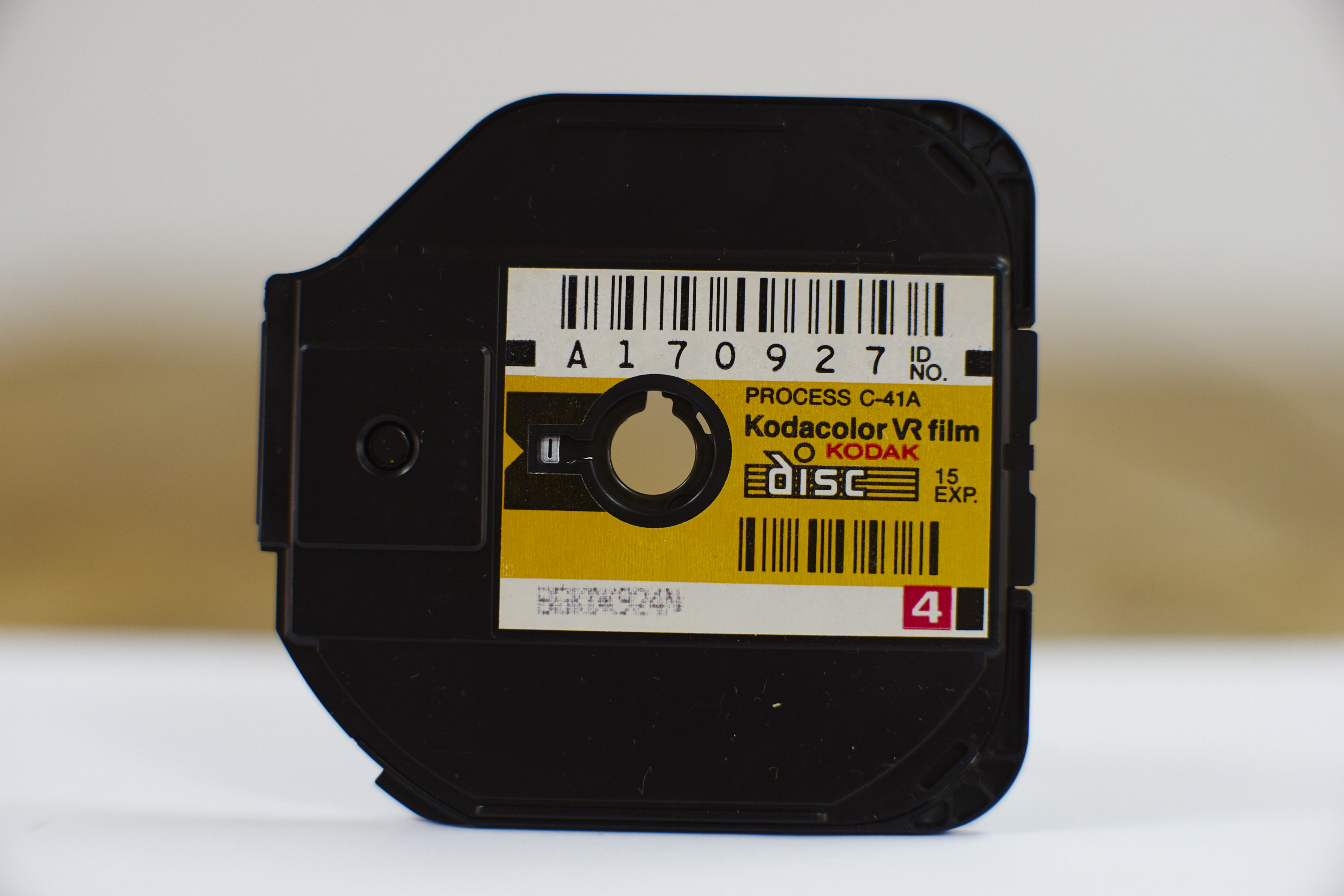 碟式底片匣